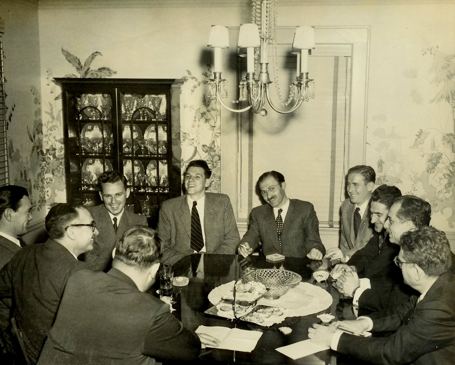 מנחם בגין, שמואל תמיר, מרדכי רענן. כחלק ממשלחת תנועת החירות לגיוס תרומות לנפגעי האצל, בדצמבר 1948